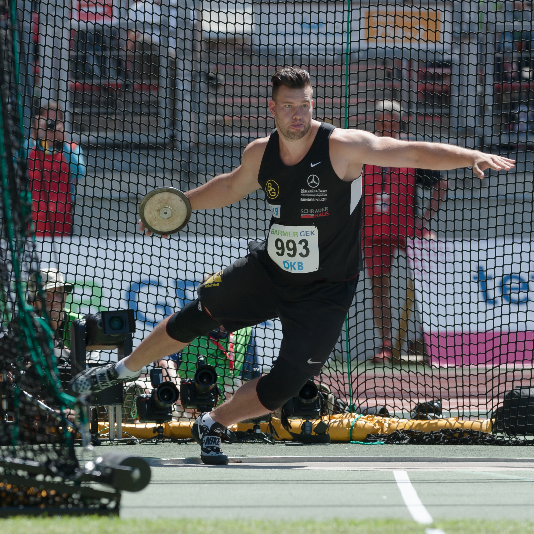 Deutsche Leichtathletik-Meisterschaften 2015: Männer Diskuswurf - Martin Wierig, Sportclub Magdeburg